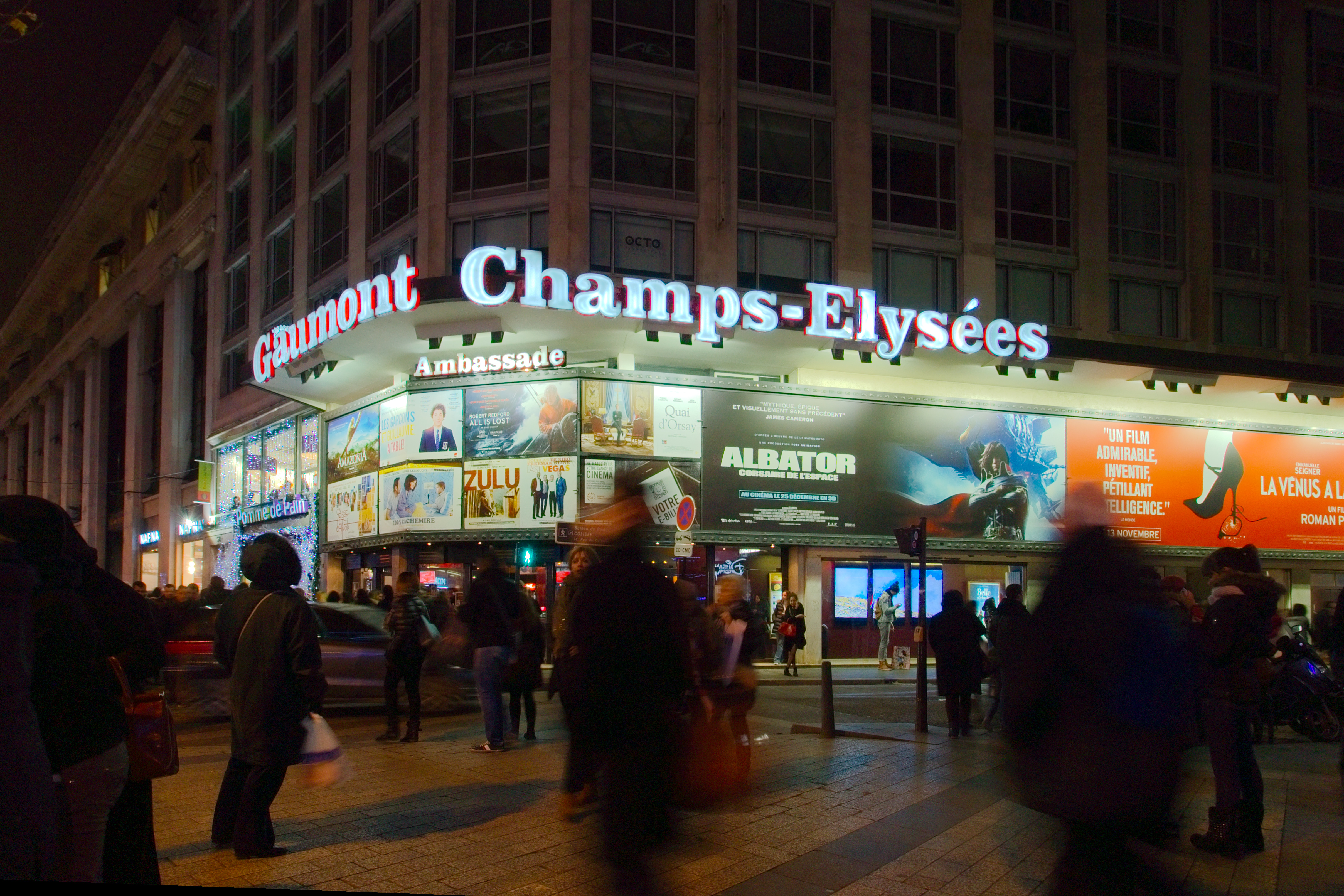 Cinéma Gaumont Champs-Élysées, avenue des Champs-Élysées à Paris, France.